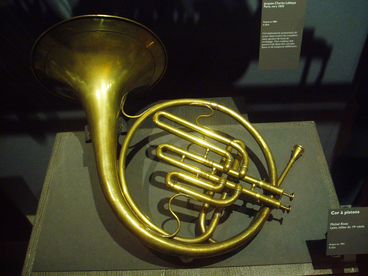 Cor à deux pistons, two valves horn - Michel Rivet, Lyon, Mid. XIXth century - Paris, musée de la musique